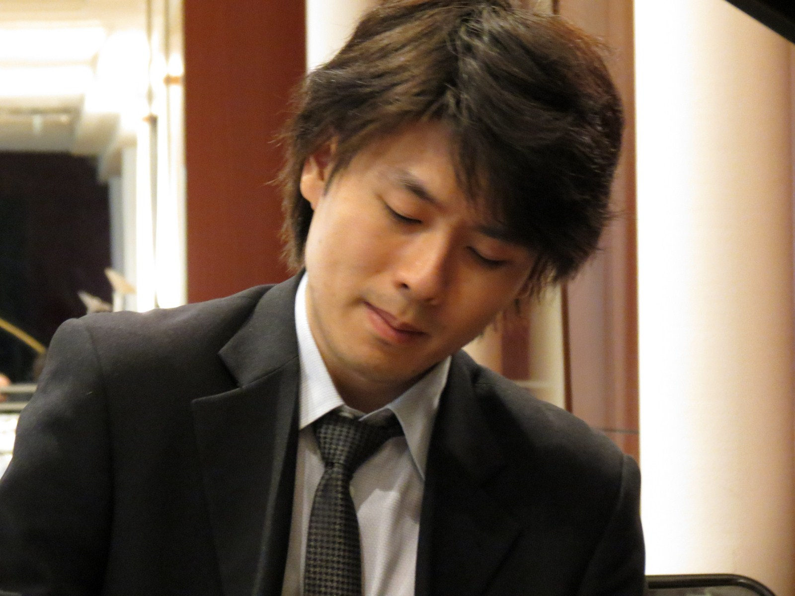 Kotaro FUKUMA en répétition avant un concert